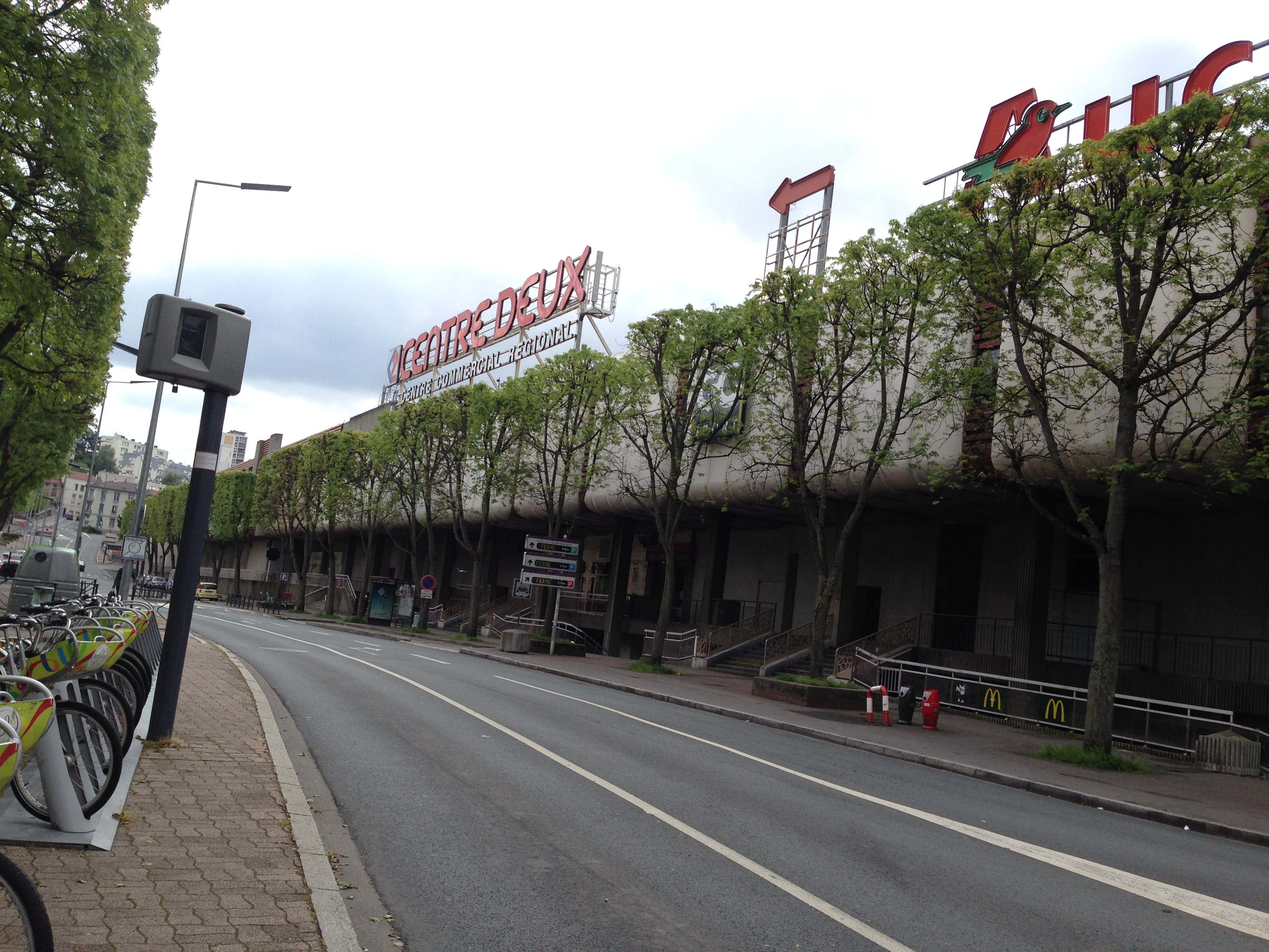 Centre commercial de Centre Deux à Saint-Etienne